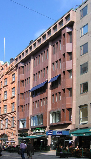 Skånska Banken Södergatan Malmö ark.: C A Acking